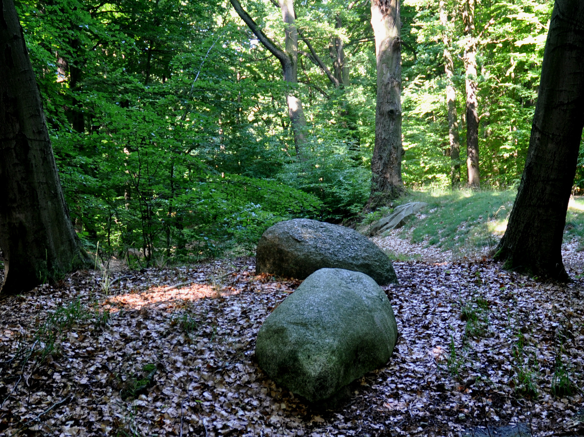 Findlinge am Ostdrive als Blickfänger für dahinterliegende "Schlucht"